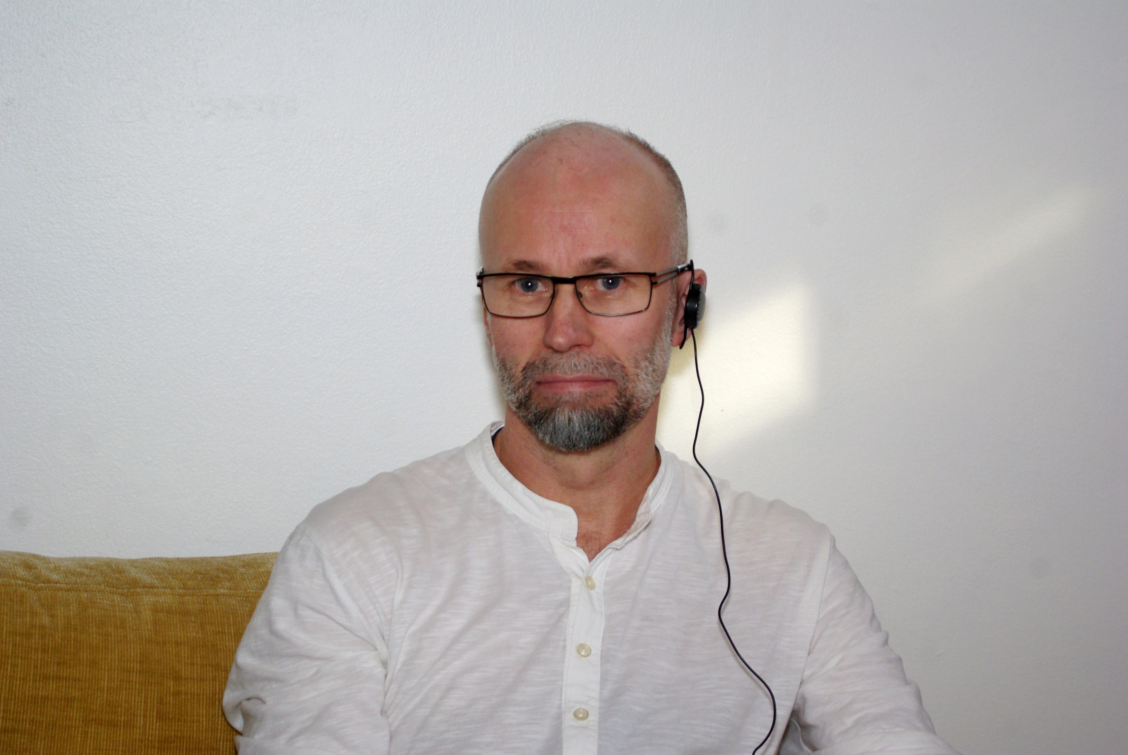 El escritor sueco Johan Theorin en la Feria Internacional del Libro de Santiago 2015